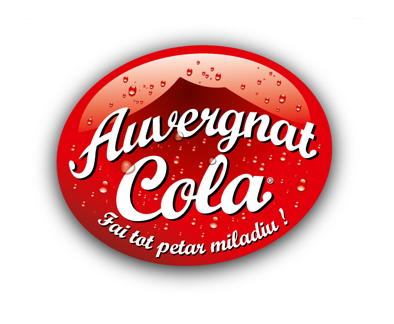 logo Auvergnat Cola